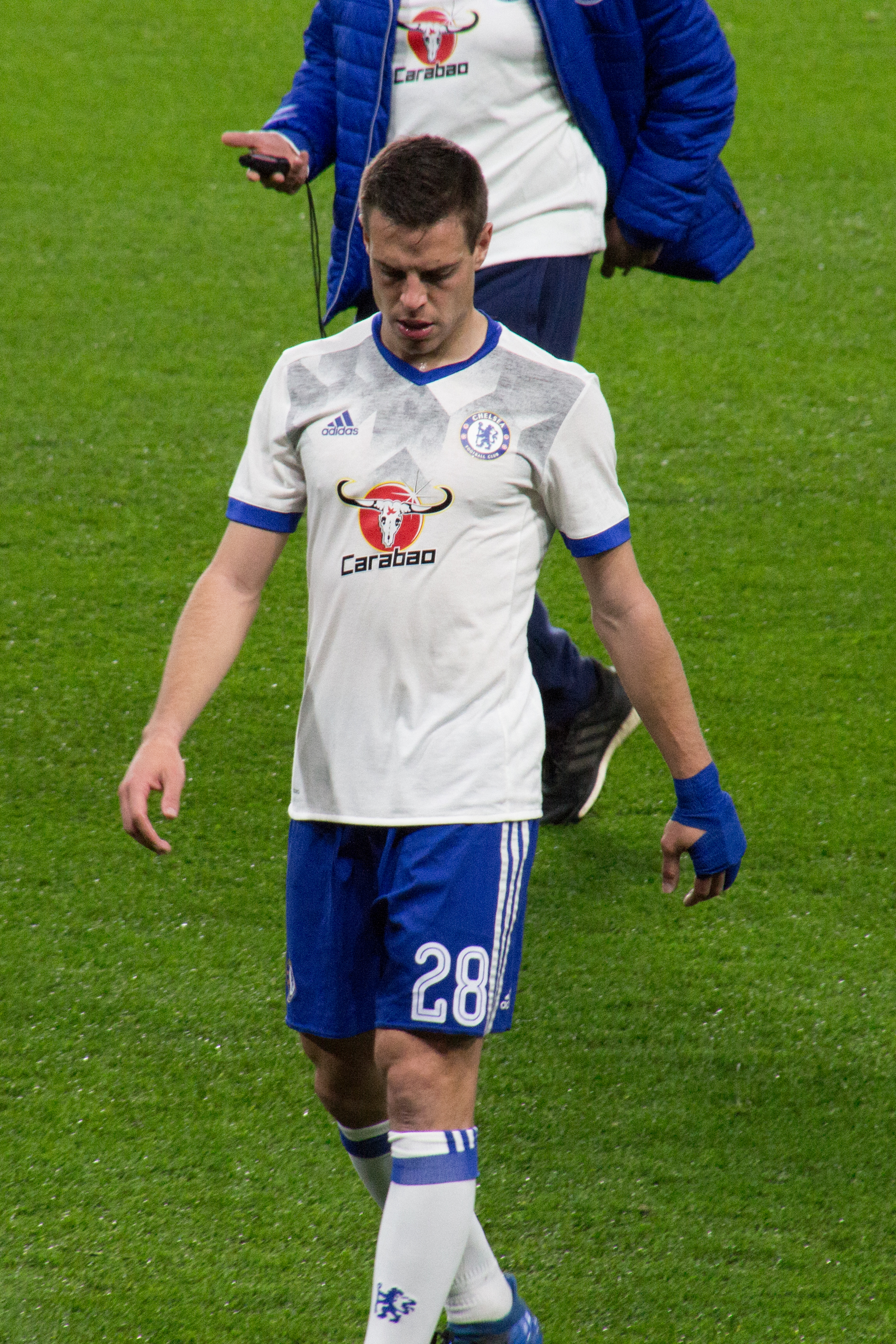 Chelsea 1:0 Man Utd 13.03.17 FA Cup QF